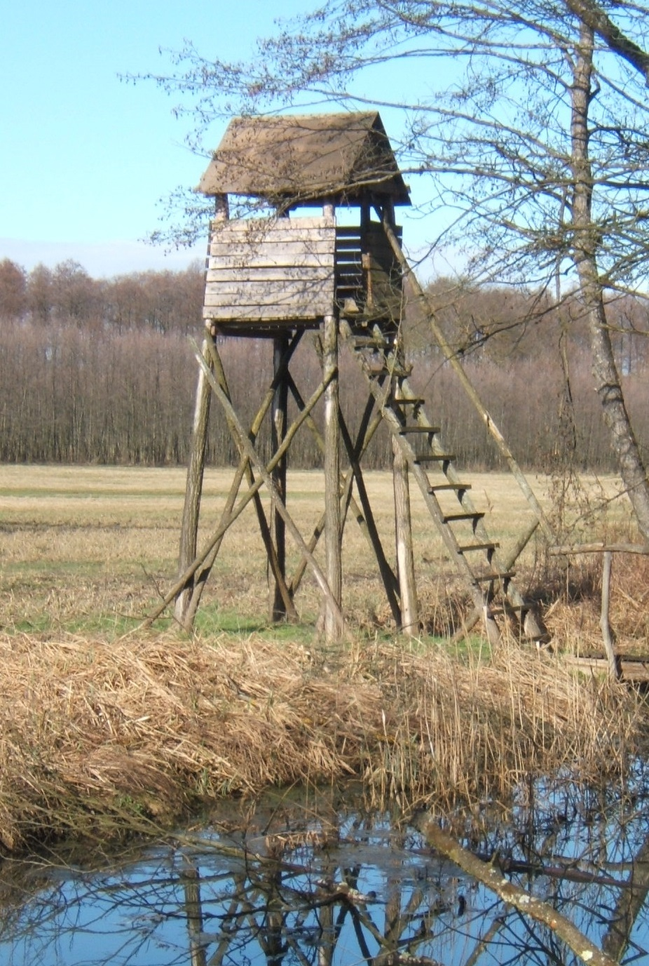 Magasles Nagybajom külterületén, Nagybajomtól északra, az Aranyos-patak mentén (Somogy megye)